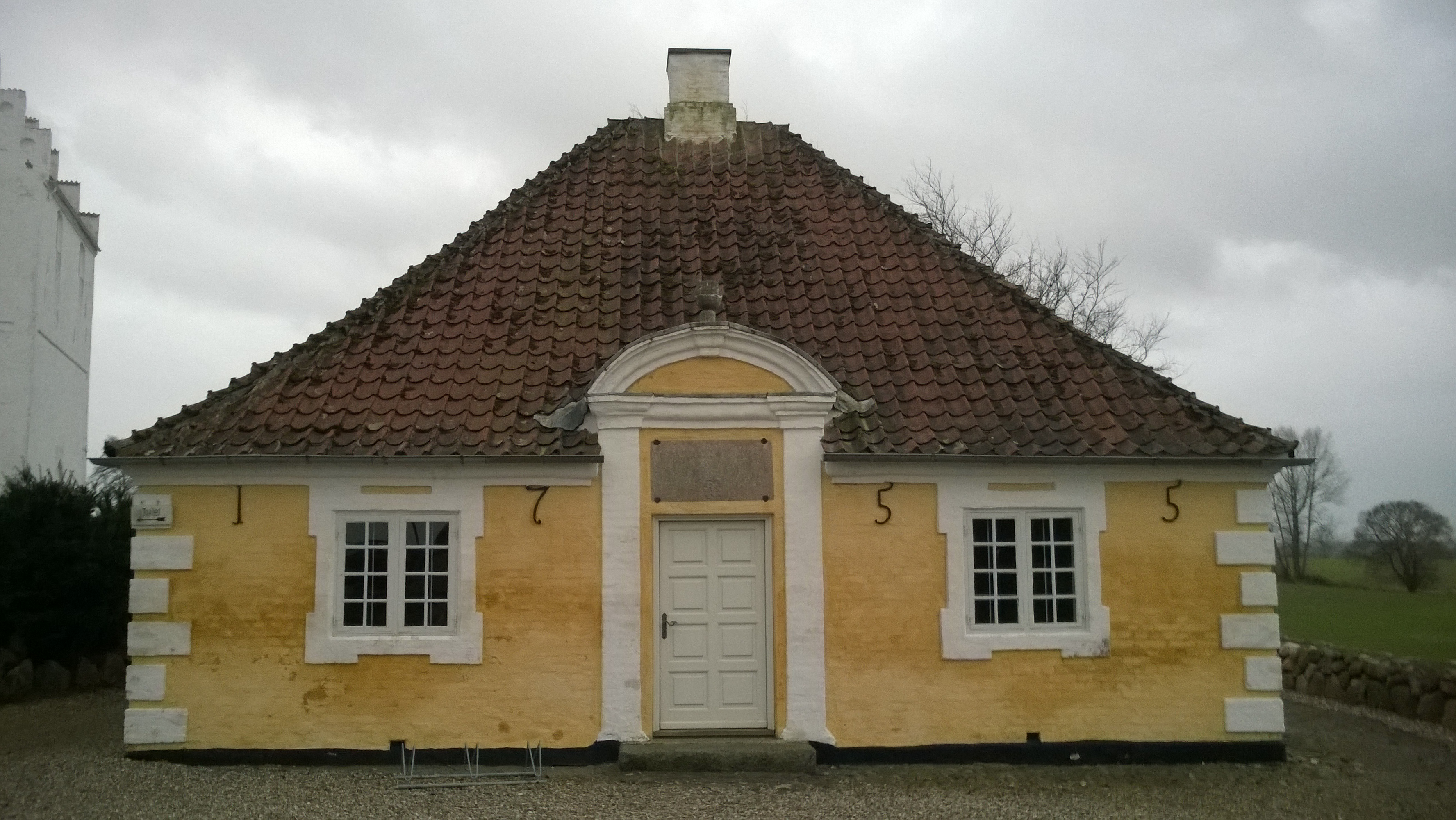 Aunslev Hospital set fra N, februar 2016